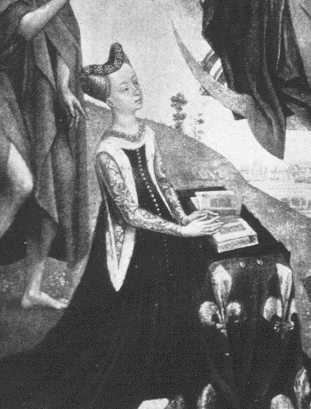 Joan